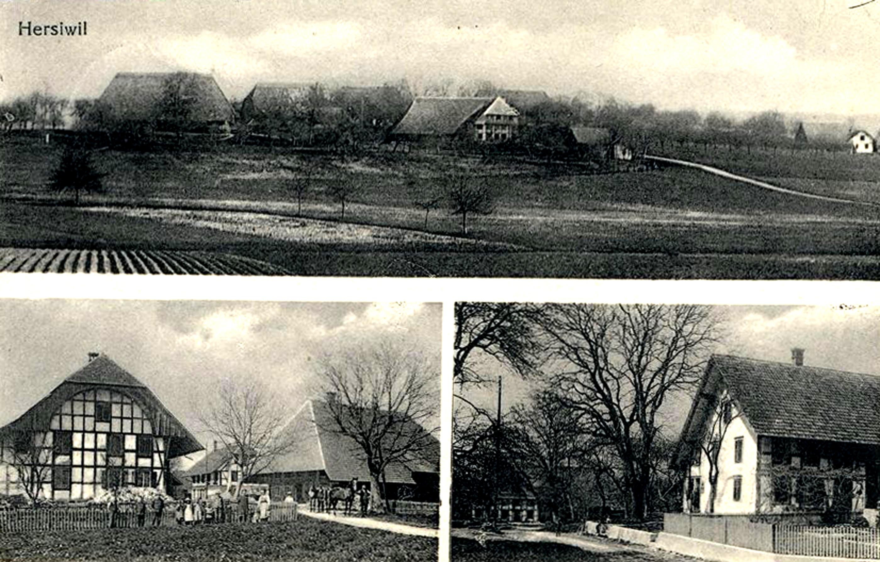 alte Postkarte von Hersiwil um 1900